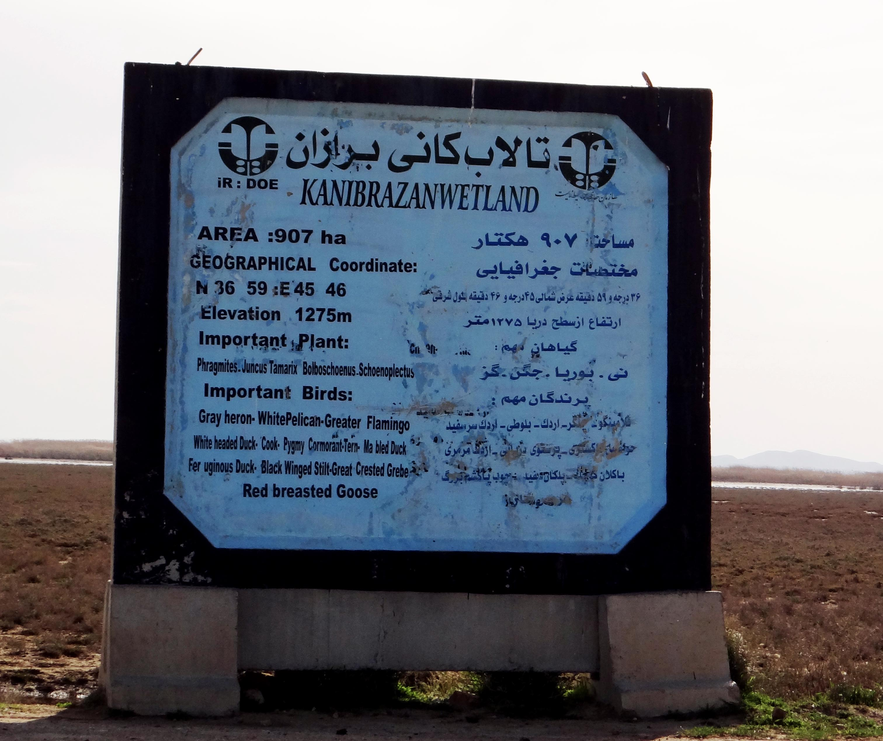 تالاب بین‌المللی کانی برازان با وسعتی افزون بر ۹۱۰ هکتار در ۳۰ کیلومتری شمال مهاباد واقع شده و از سوی کمیته ملی طبیعت گردی کشور به عنوان نخستین سایت پرنده نگری در ایران معرفی شده است